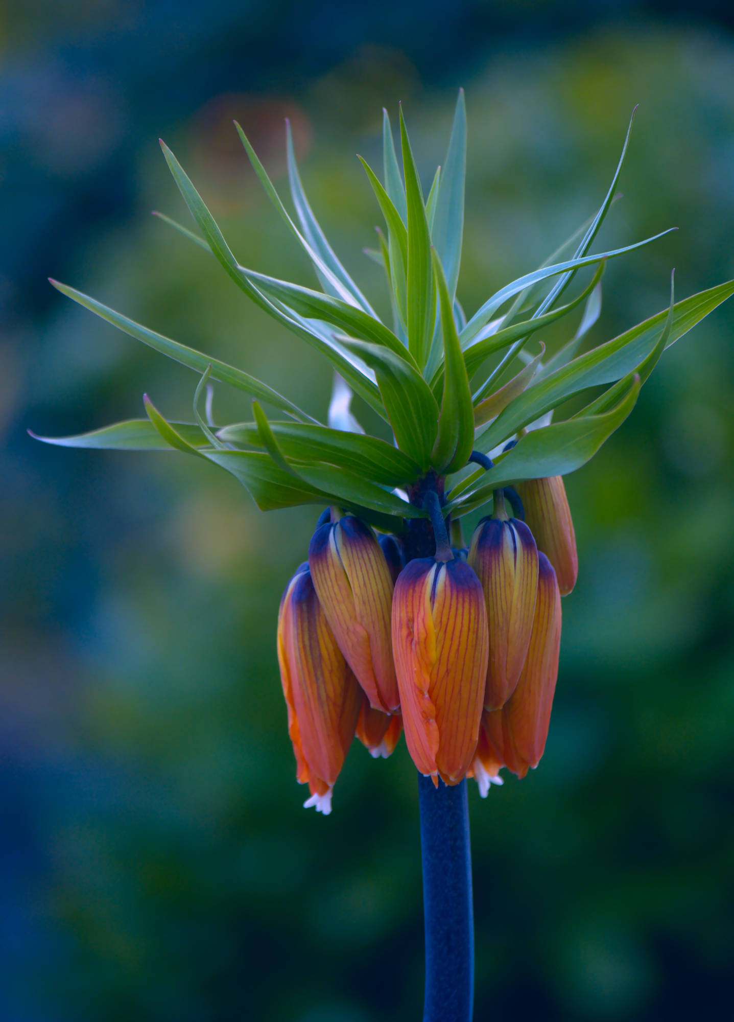 Großen, noch geschlossene Blüten der Kaiserkrone / "Orange Billian"